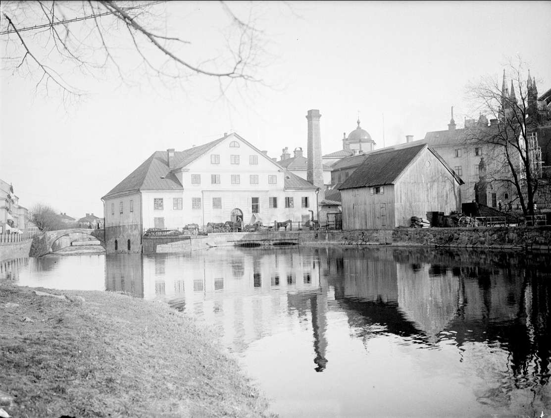 Akademikvarnen på Kvarnholmen i Fyrisån, Uppsala 1901 - 1902